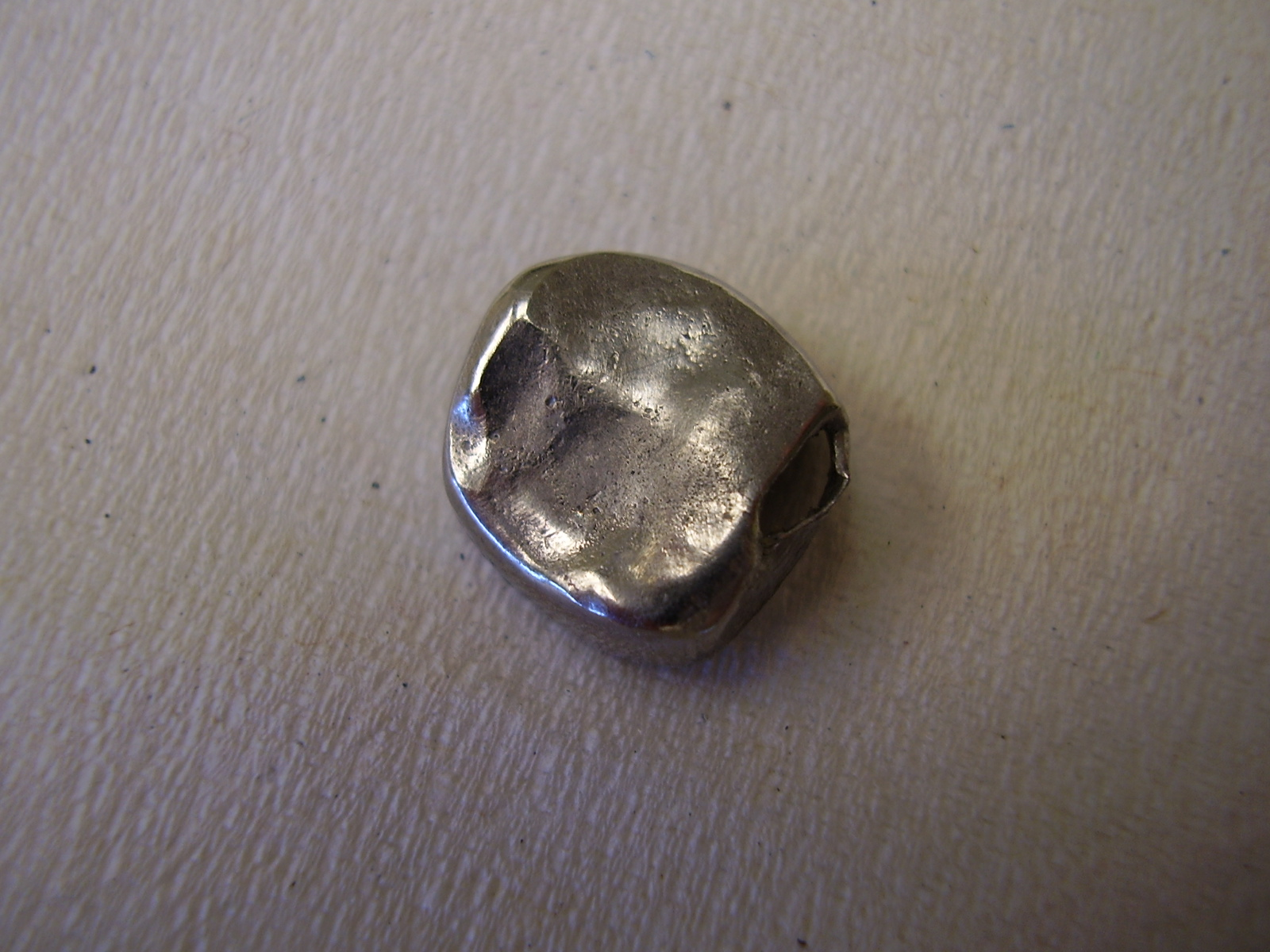 destroyed dental crown, zerstörte dünne Zahnkrone (aus Blech)